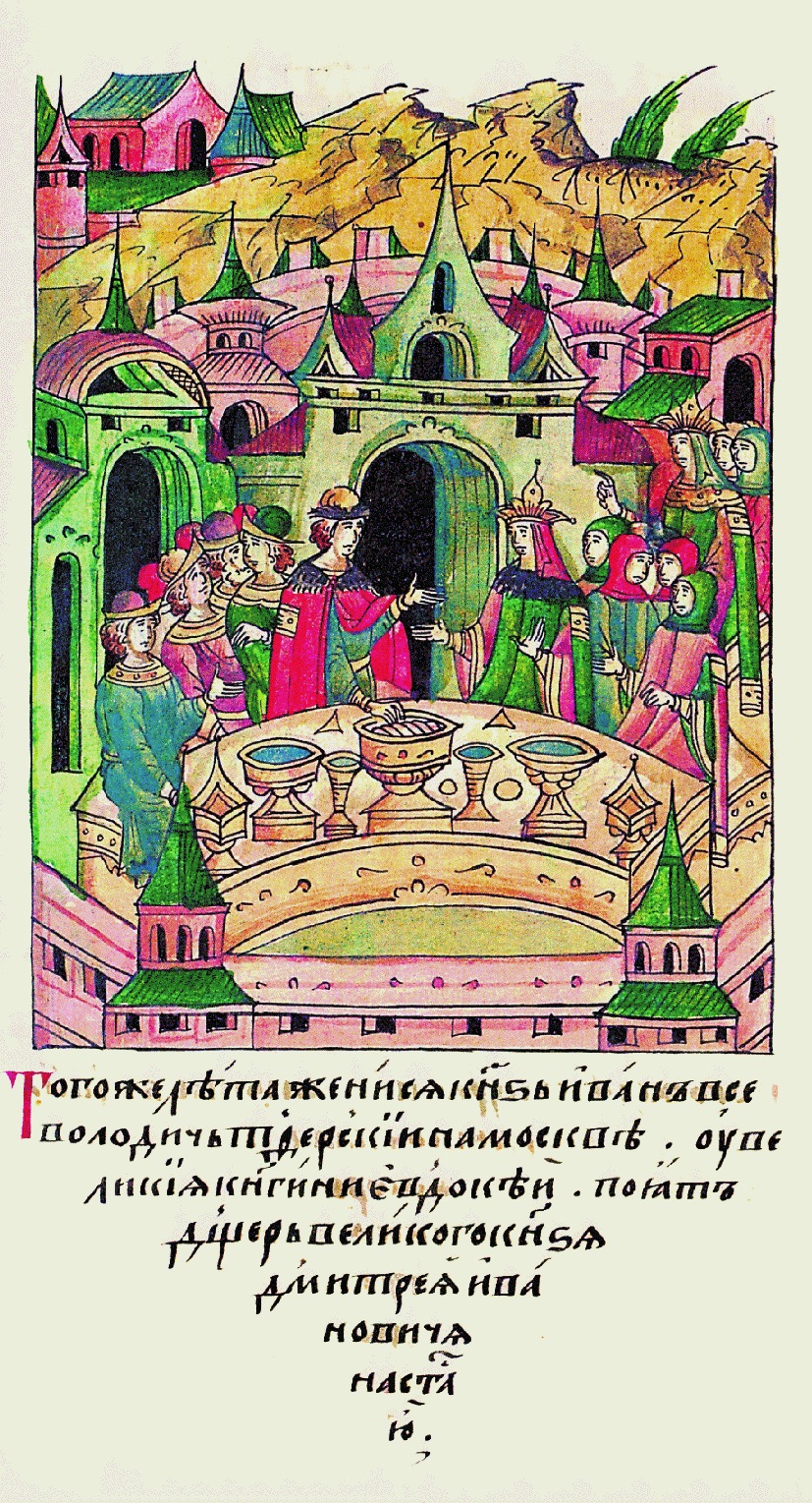 В том же году женился князь Иван Всево- лодович Тверской в Москве у великой княгини Евдокии, взяв дочь великого князя Дмитрия Ивановича Настасью